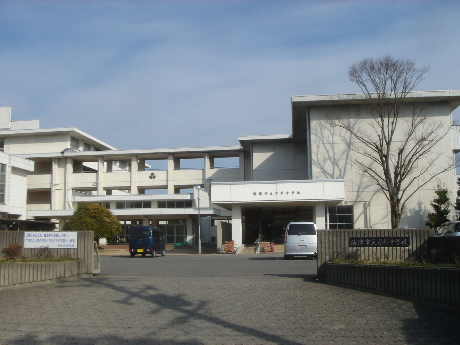 (海津市立日新中学校),Kaizu,Gifu,Japan(岐阜県海津市)で撮影。